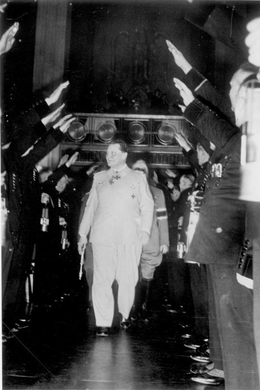 Hermann Göring übergab Bergarbeitern das Kriegsverdienstkreuz mit Schwertern. - 568 Bergleute aus allen Revieren des deutschen Bergbaues, und 57 Arbeiter der Reichswerke Hermann Göring waren am Sonnabend nachmittag einer Einladung des Reichsmarschalls Göring in das Haus der Flieger in Berlin gefolgt, wo der Reichsmarschall ihnen das vom Führer und Obersten Befehlshaber der Wehrmacht verliehene Kriegsverdienstkreuz übergab. 67 von ihnen erhielten für ihren tapferen Einsatz das Kriegsverdienstkreuz mit Schwertern. Als Parole für die kommende Zeit betonte der Reichsmarschall in seiner Rede, dass wir rüsten und kämpfen müssten. Unser Bild zeigt Reichsmarschall Hermann Göring bei der Ankunft im großen Festsaal des Hauses der Flieger, als er durch das Spalier der Bergleute schritt. PK-Lange Scherl